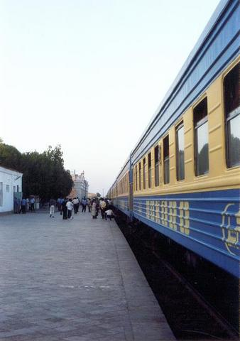 train Bukhara-Tashkent, at Bukhara station, Uzbekistan